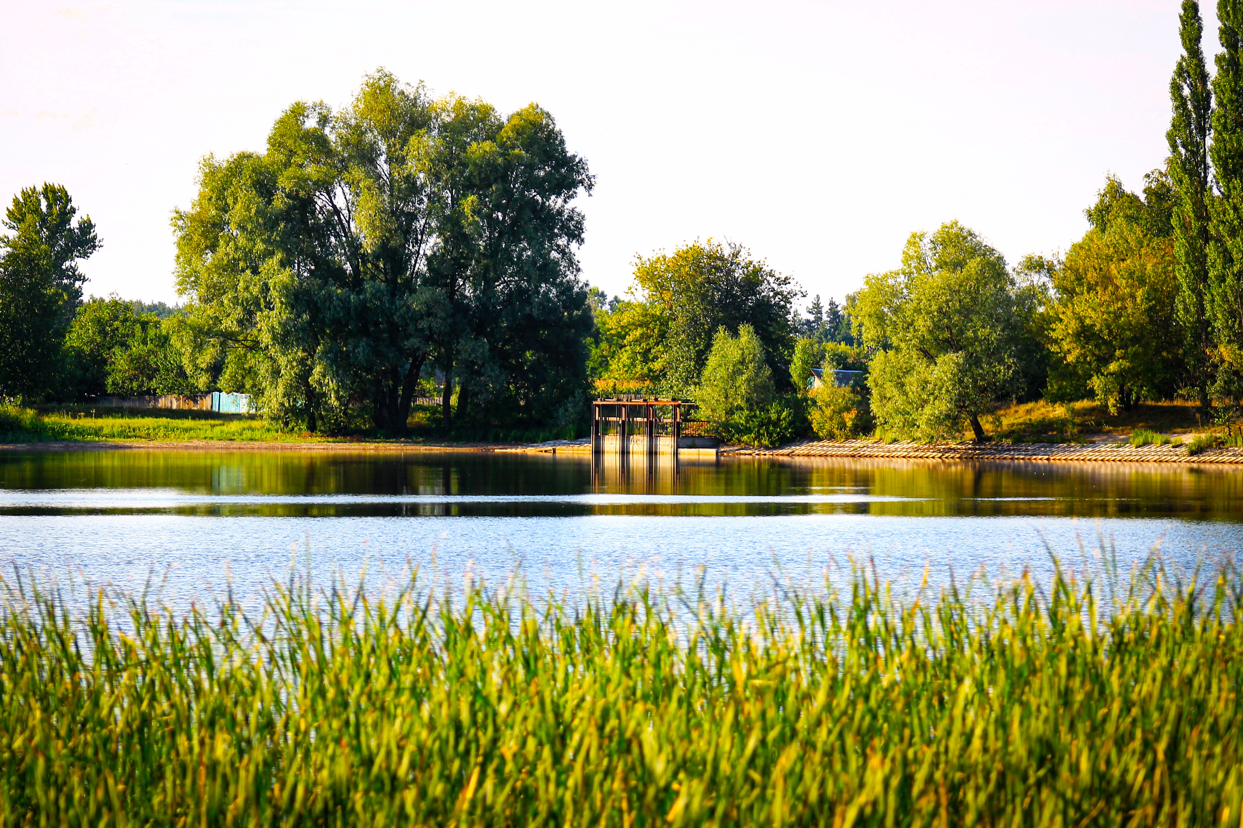 Московський Бобрик (ставок вид на дамбу)